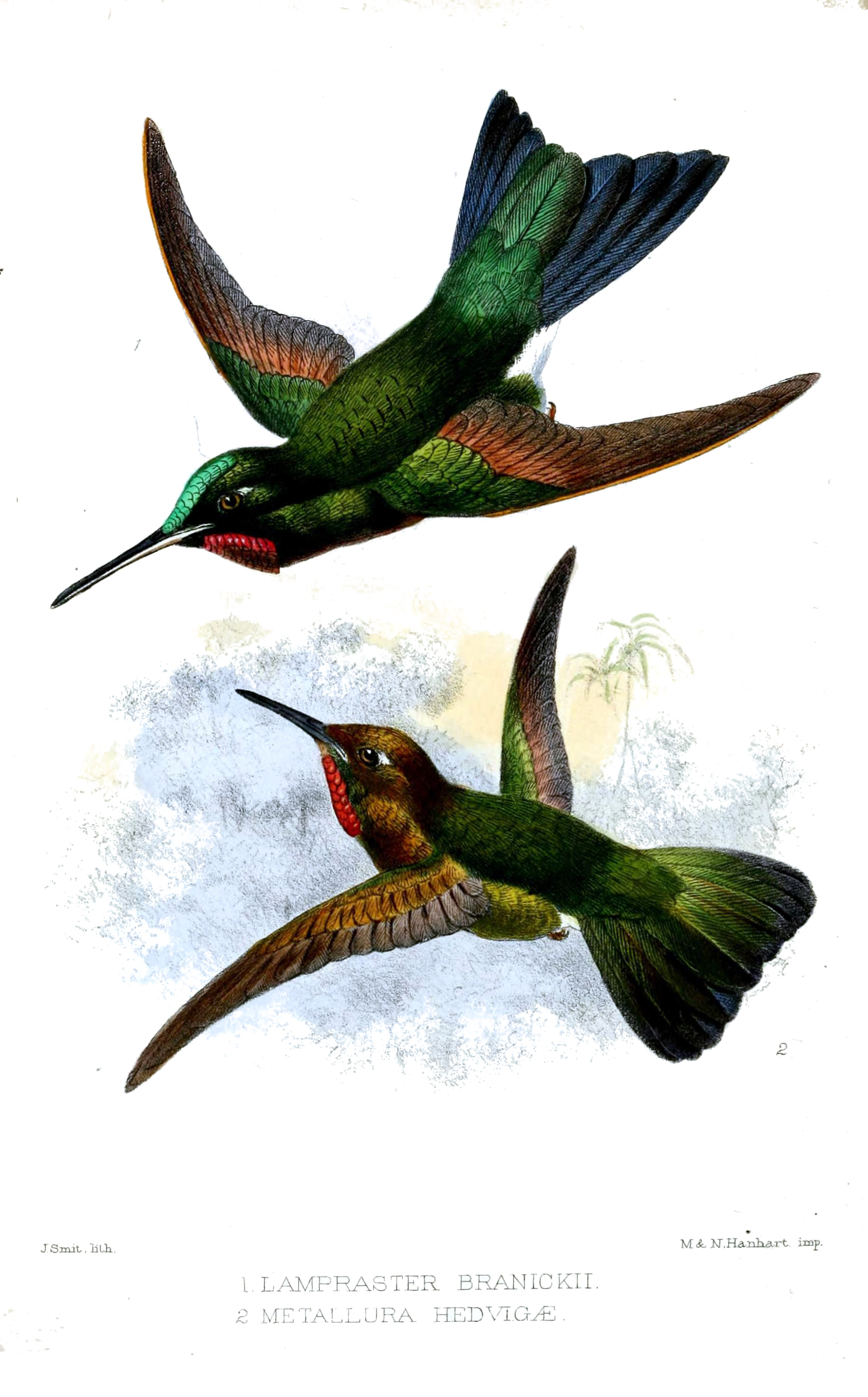 Lampraster branickii (=Heliodoxa branickii) & Metallura hedvigae (=Metallura eupogon)